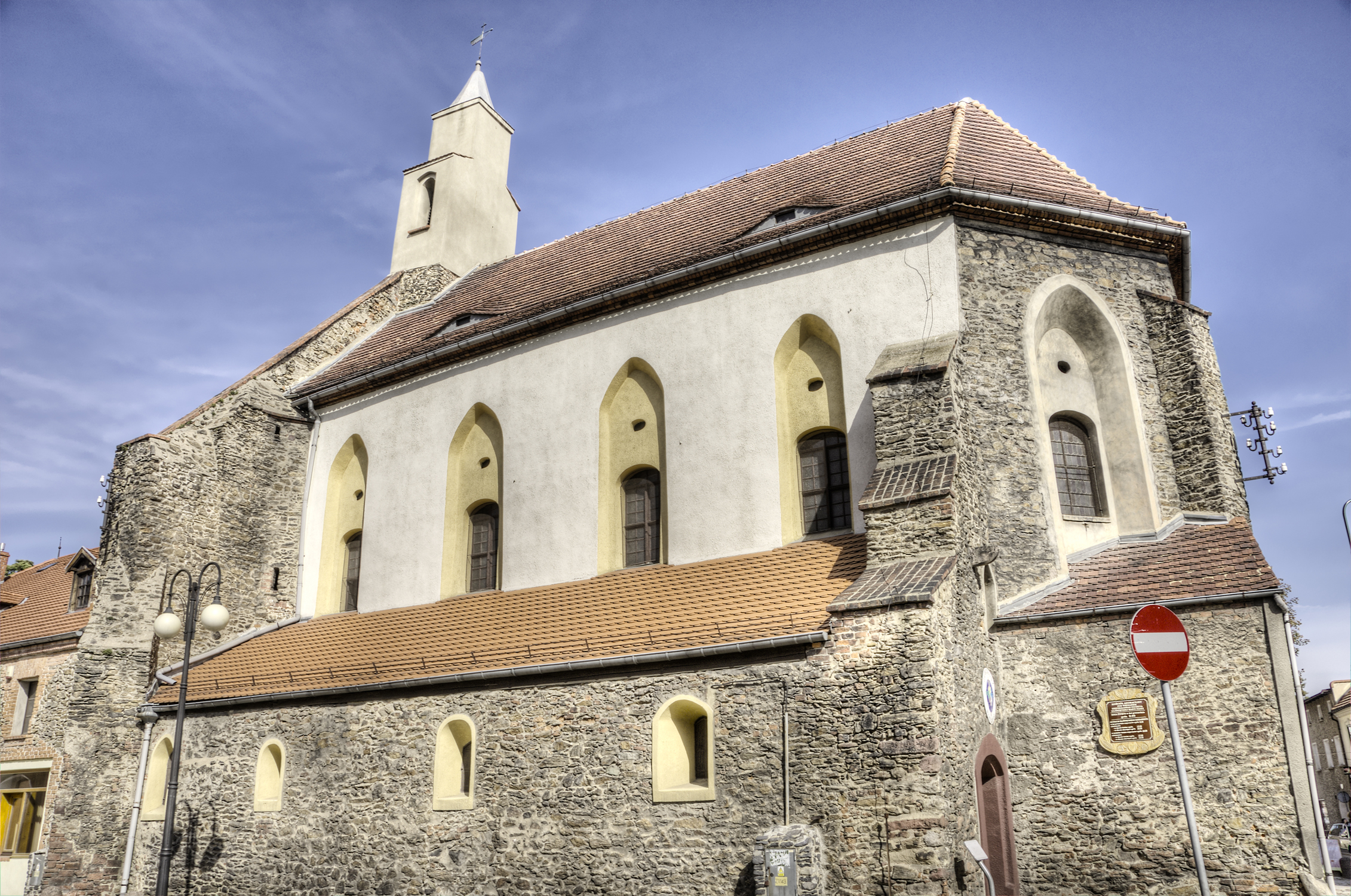 kościół poaugustiański pw. Niepokalanego Poczęcia Najświętszej Marii Panny Dzierżoniów, Klasztorna, Dzierżoniów